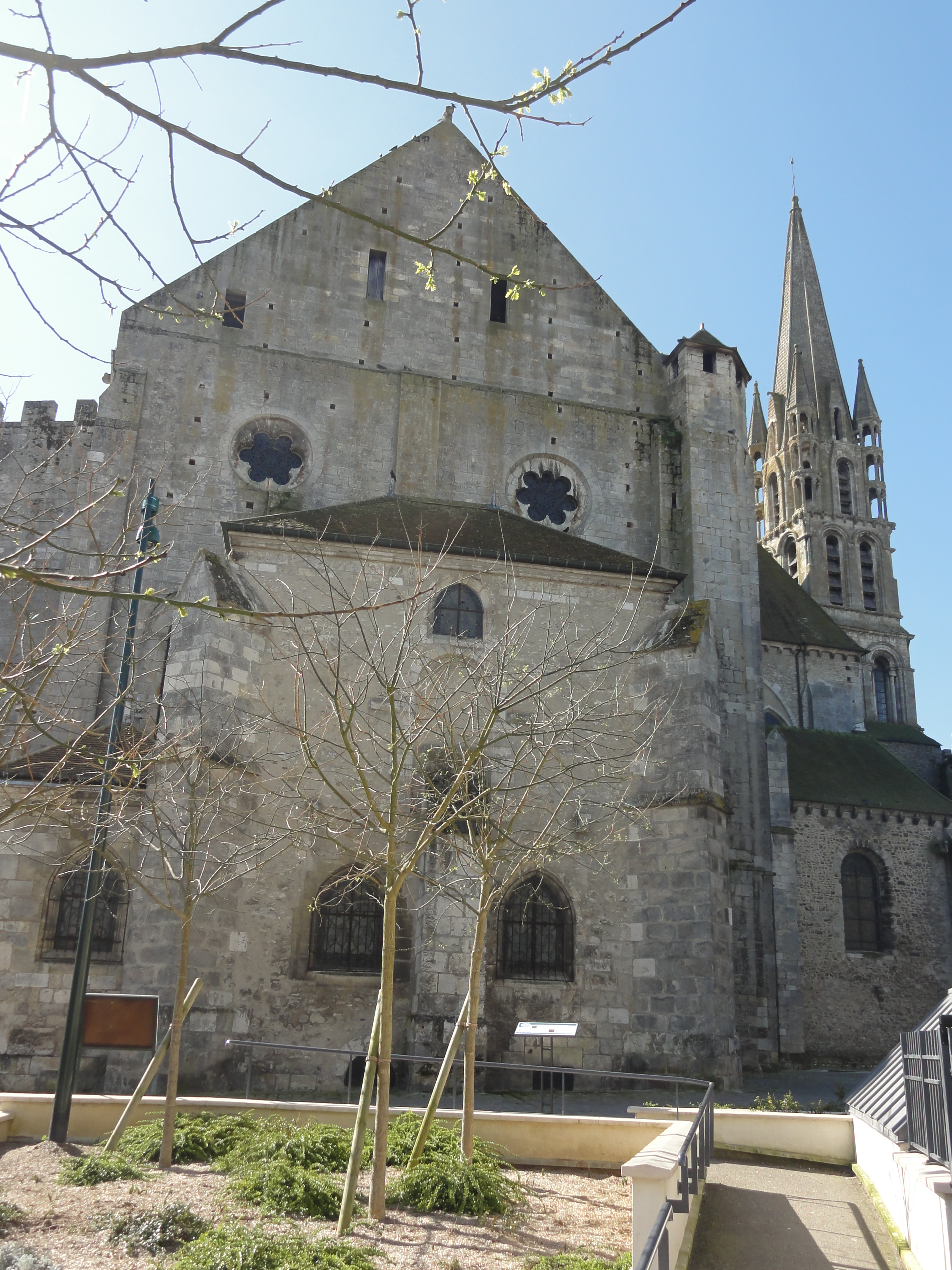 Croisillon nord.